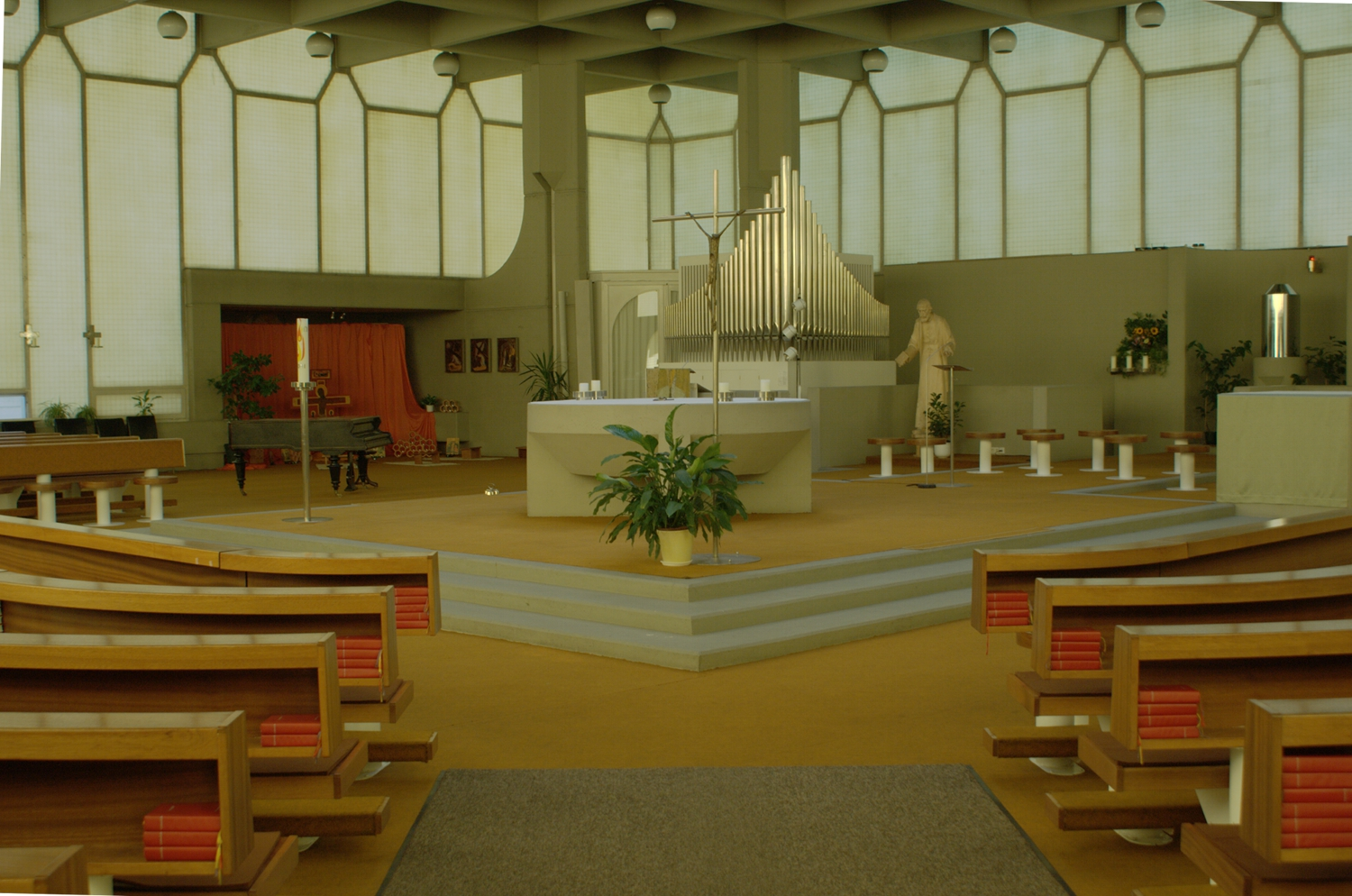 Kath. Pfarrkirche hl. Petrus Canisius und Pfarramt: Innenraum